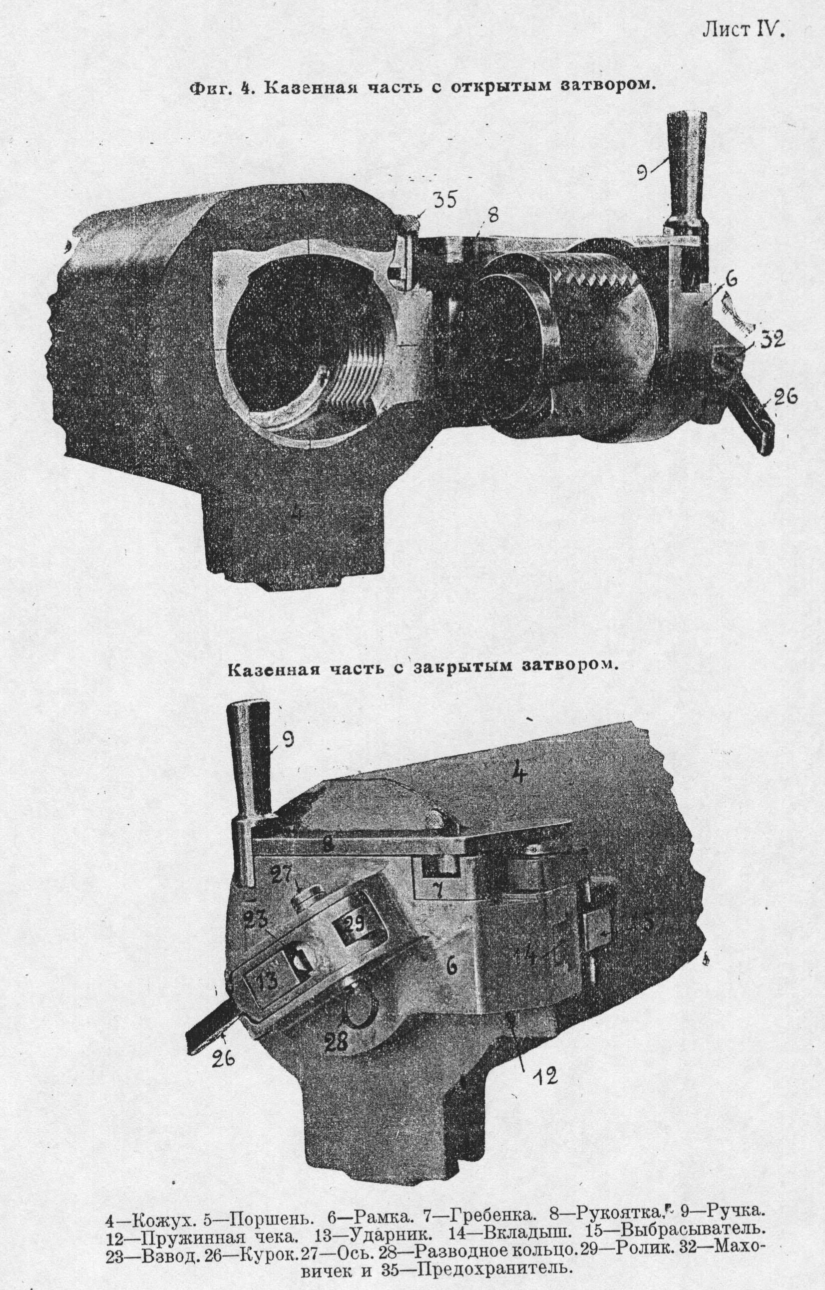 Казенная часть 76-мм полковой пушки обр.1927 г.